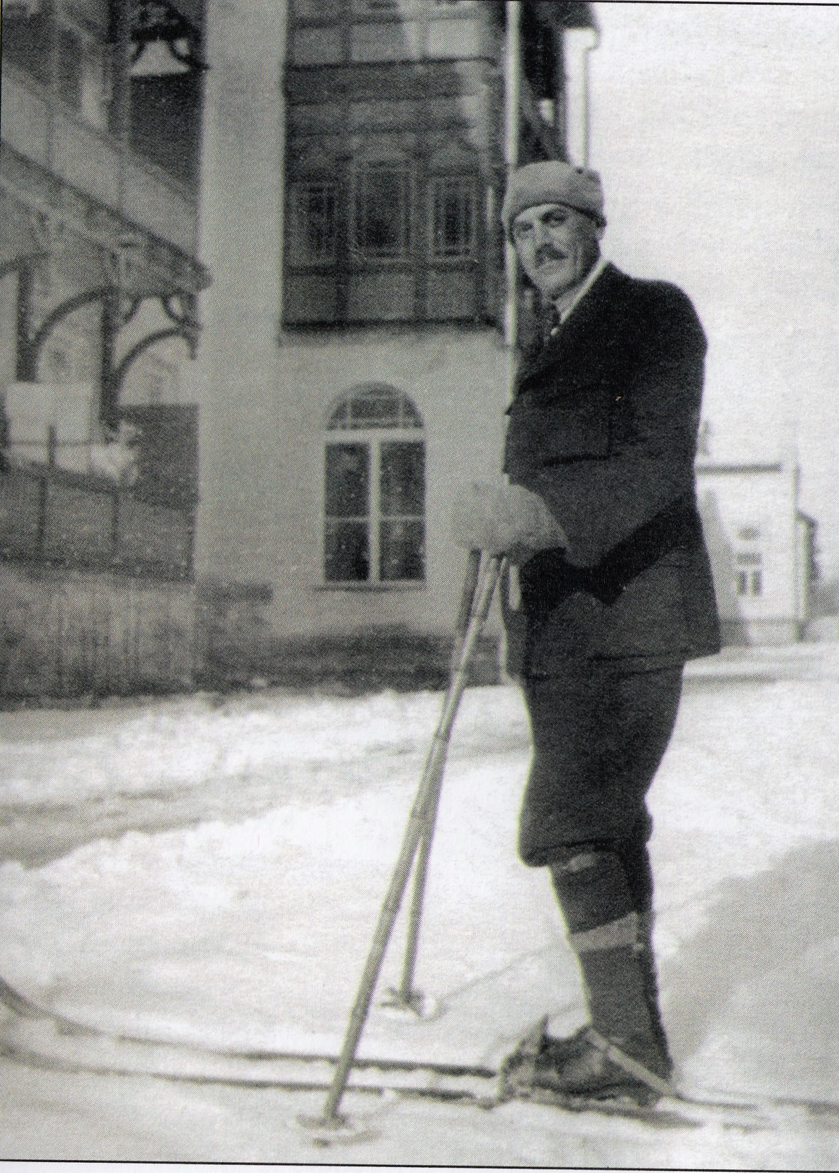 Lekár, jeden zo zakladateľov liečebných kúpeľov v Tatranskej Polianke vo Vysokých Tatrách. (* 17. marec 1873, † 23. august 1933)